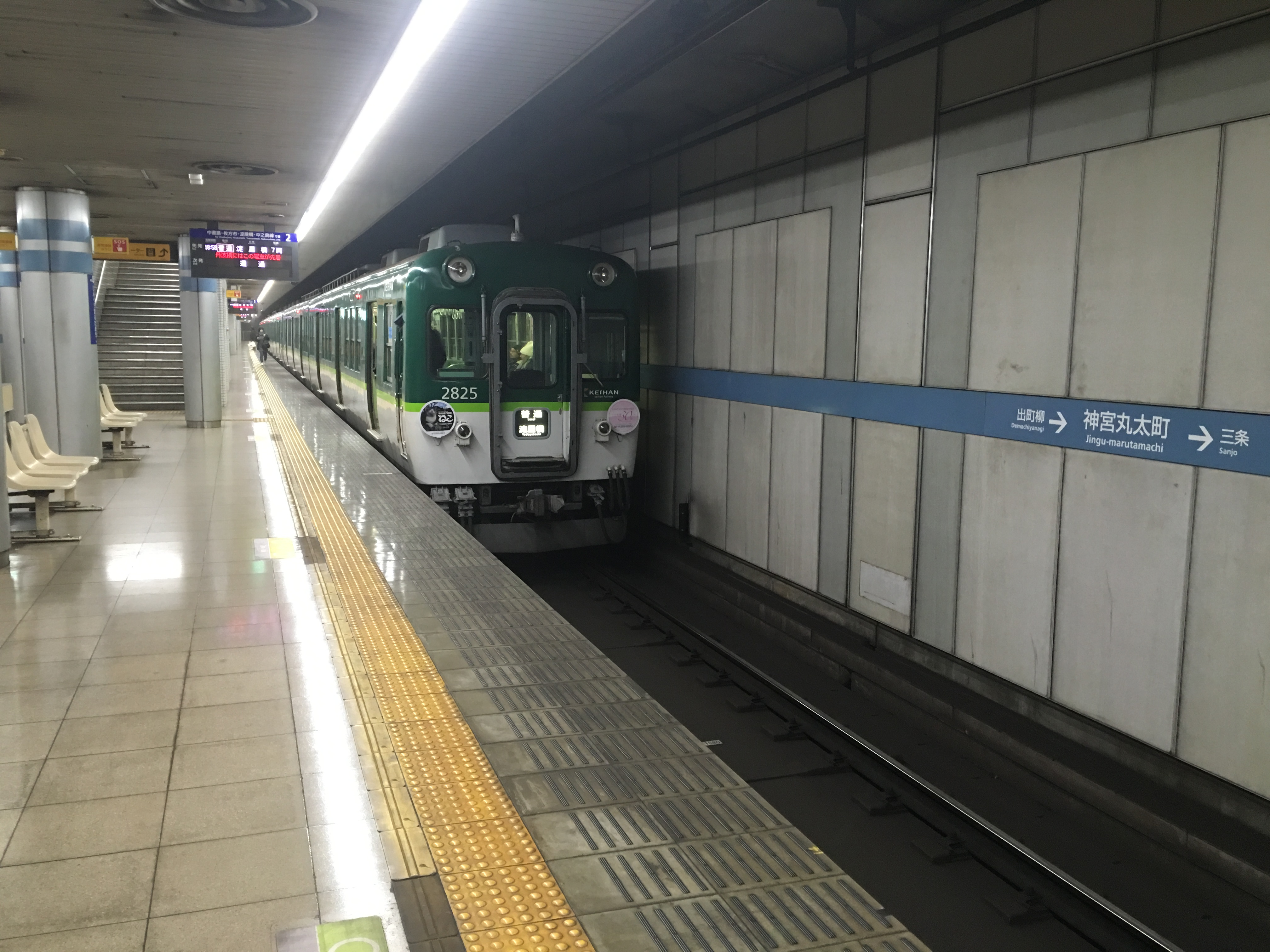 神宮丸太町駅に停車中の2600系電車